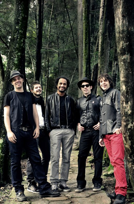 Grupo colombiano de rock Superlitio